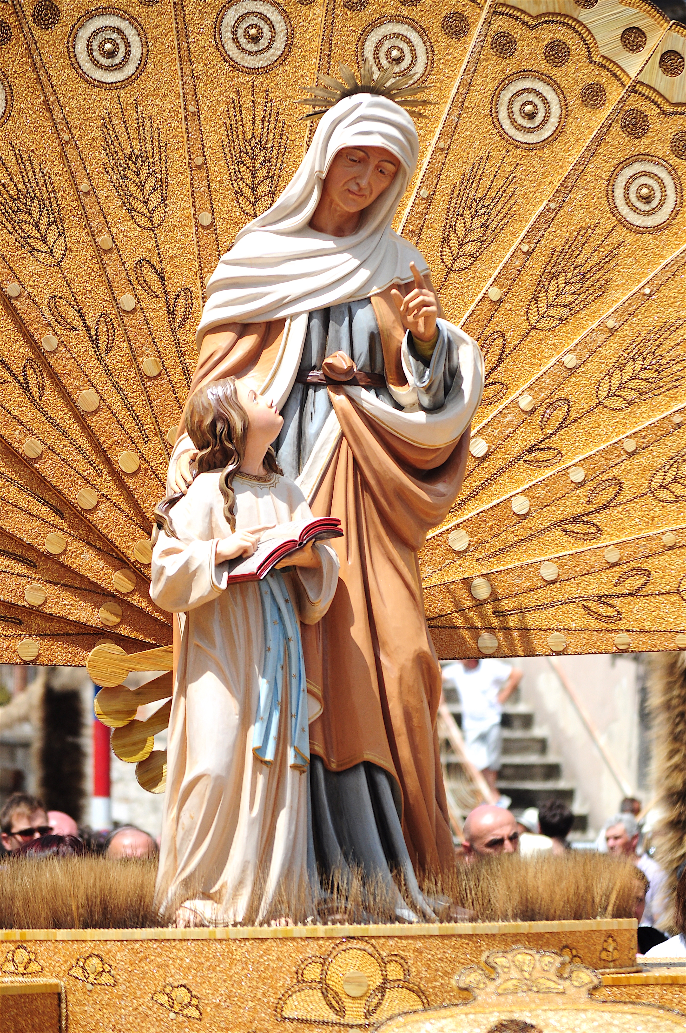 Carro con grano e paglia lavorati che trasporta Sant'Anna ogni anno il 26 luglio durante la Festa del Grano di Jelsi (Molise)